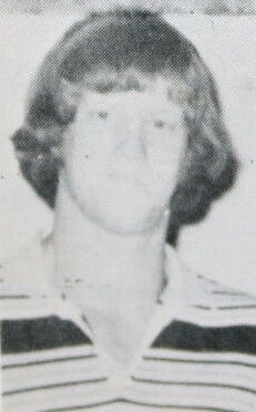 Jimmy Snuka dans le programme de catch Big Time Wrestling du 12 juillet 1977